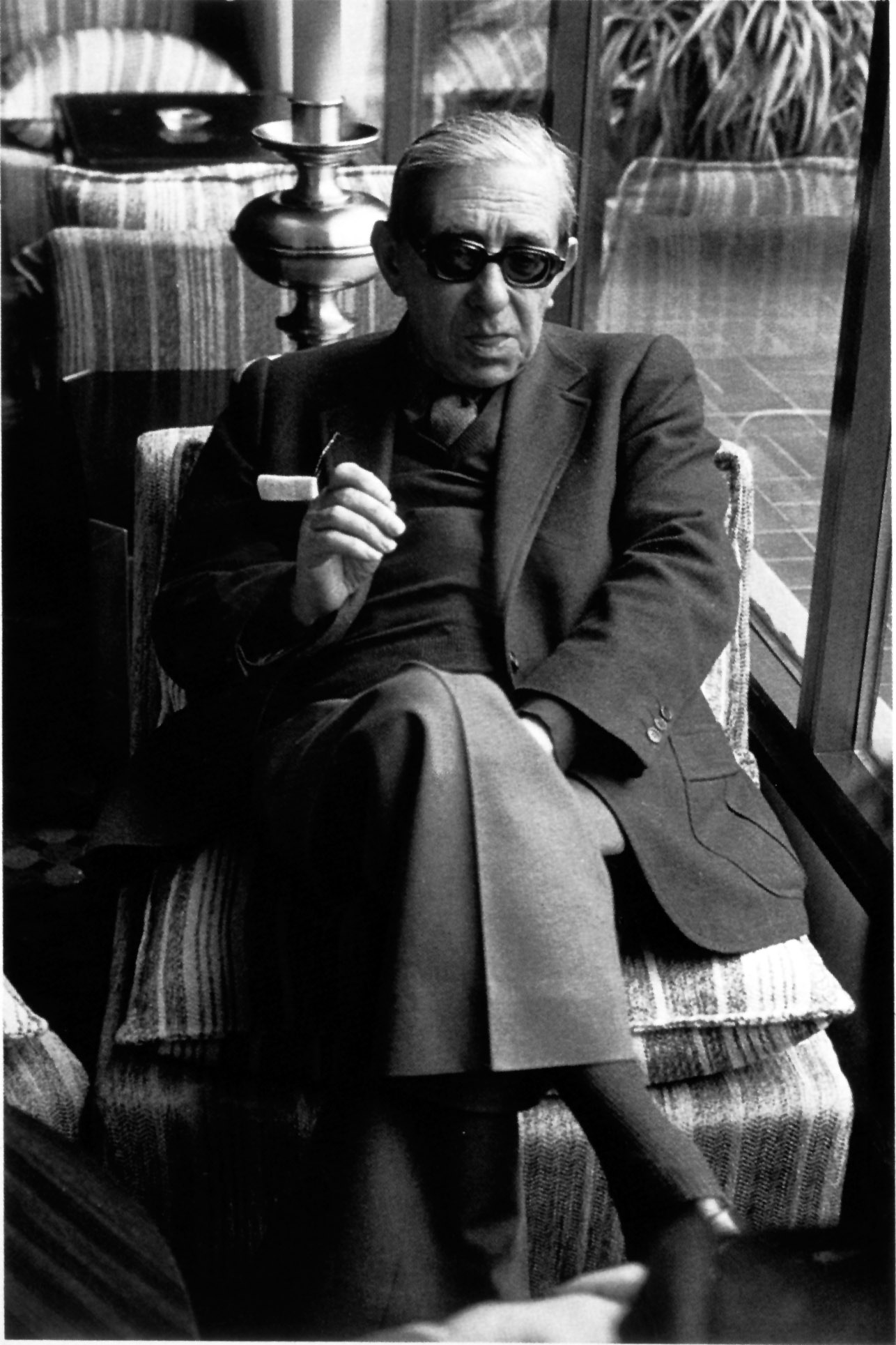 El escritor español Gonzalo Torrente Ballester en 1982